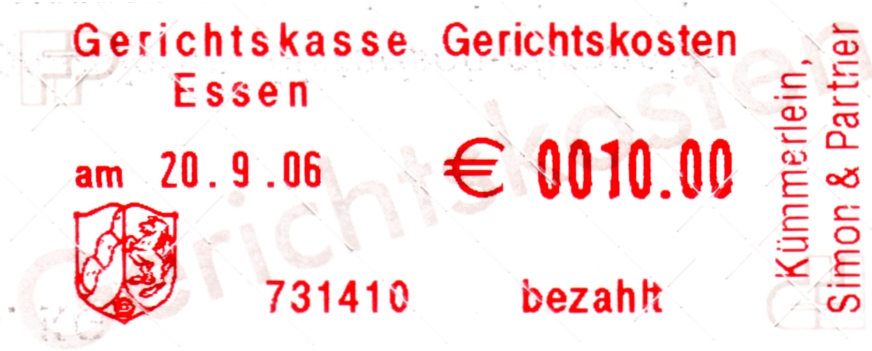 Abdruck eines Gerichtskostenfreistemplers.